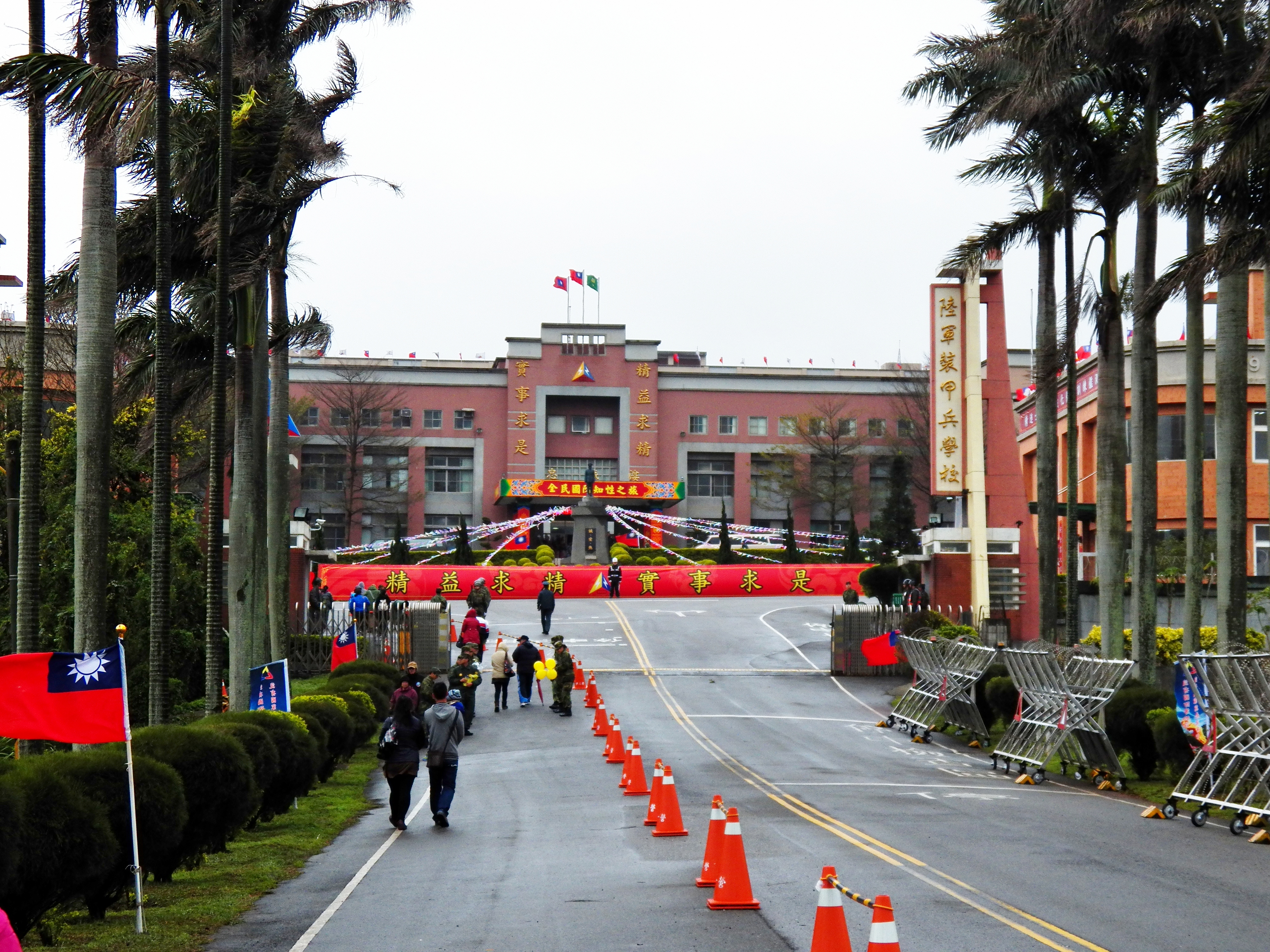 中文（台灣）: 陸軍裝甲兵學校正門前，遠方是校本部忠誠樓。